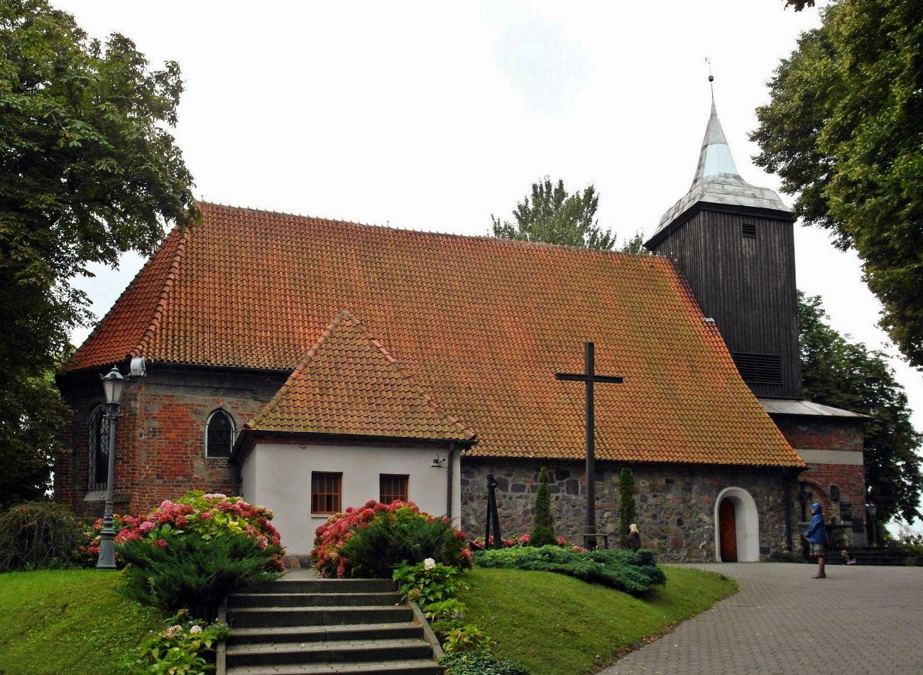 Najstarszy kościół w Gdyni. Widok strony północnej.